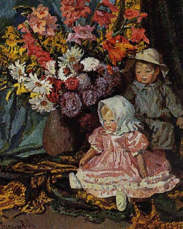 Ritta Boemm Stillleben Blumenstrauss Puppen ohne Datum